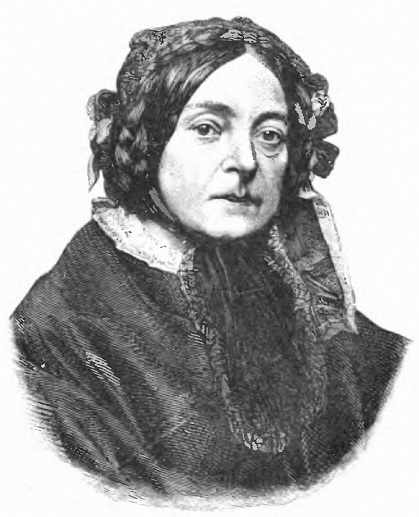 Eleonora Ziemięcka